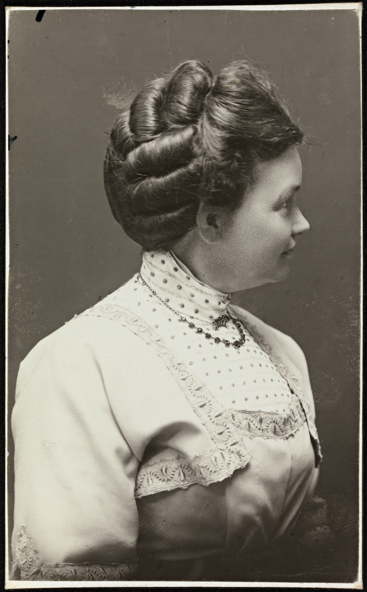 Tittel / Title: Portrett av Fredrikke Waaler (1865-1952) Beskrivelse / Description: Visittkort. Fredrikke Waaler var fiolinist, dirigent, komponist og kvinnesaksforkjemper. På baksiden av bildet har hun skrevet: "Det er kun mit eget Haar. Intet Fylderkalk." Dato / Date: mai 1912 Fotograf / Photographer: J. Larsen & A. Olsen (Hamar) Eier / Owner Institution: Nasjonalbiblioteket / National Library of Norway Lenke / Link: Bildesignatur / Image Number: blds_05828